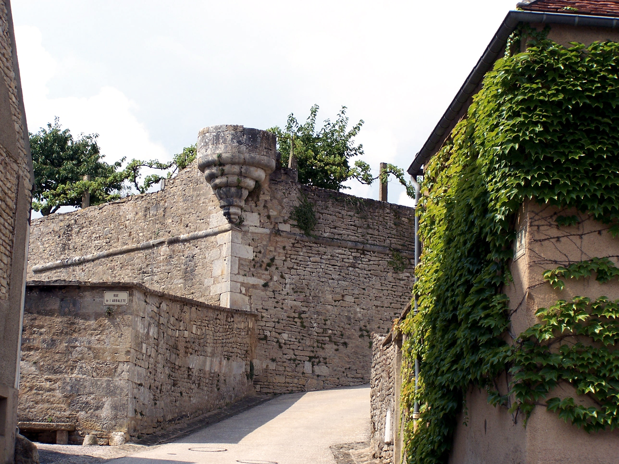 Montréal dans l'Yonne Août 2006